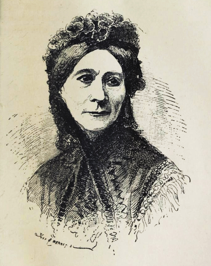 Hersilie Rouy (1814-1881)